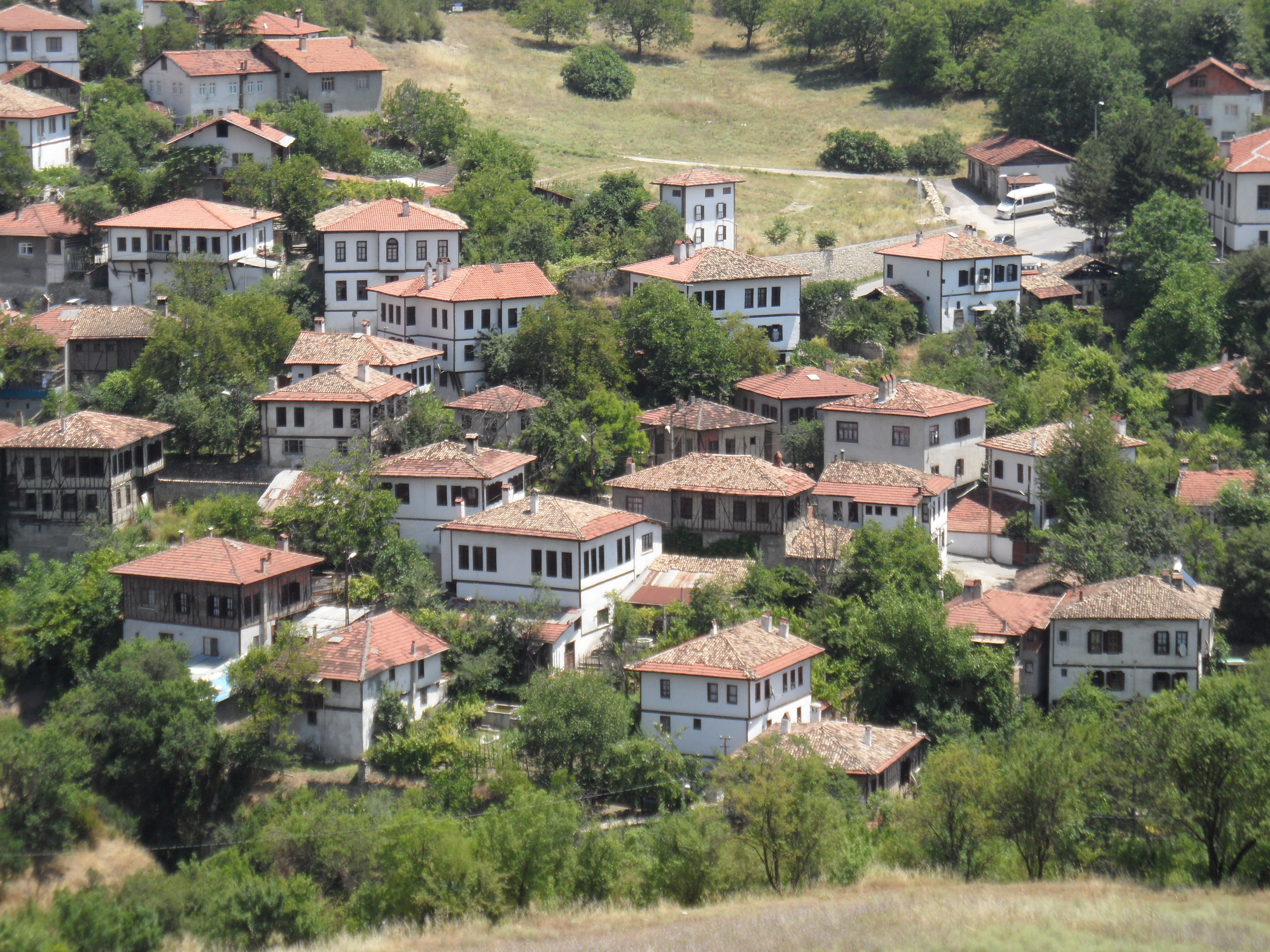 Safranbolu, 78600 Safranbolu/Karabük, Turkey